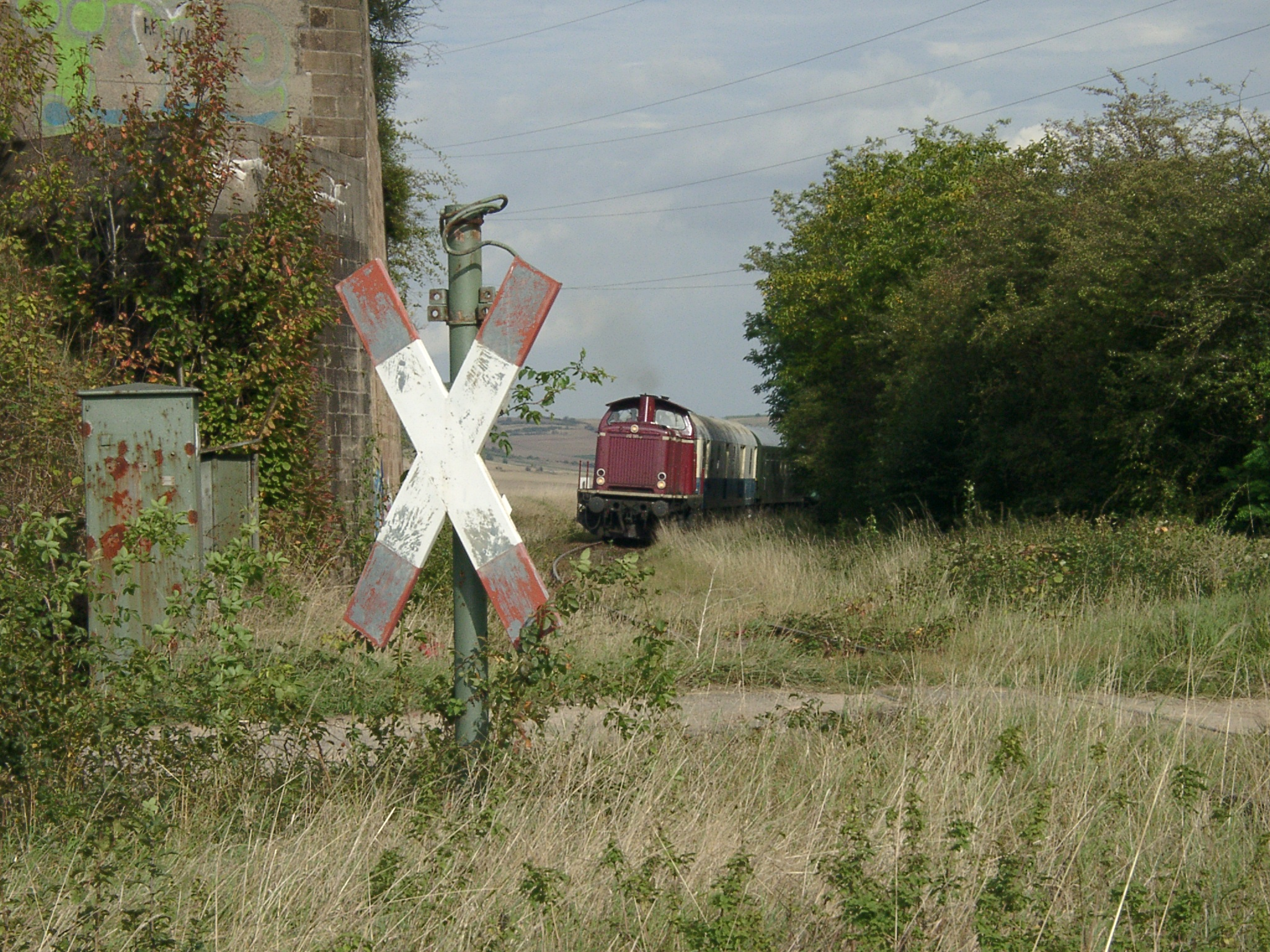 Eine V100 mit Sonderzug vorn Marnheim/Zellertal